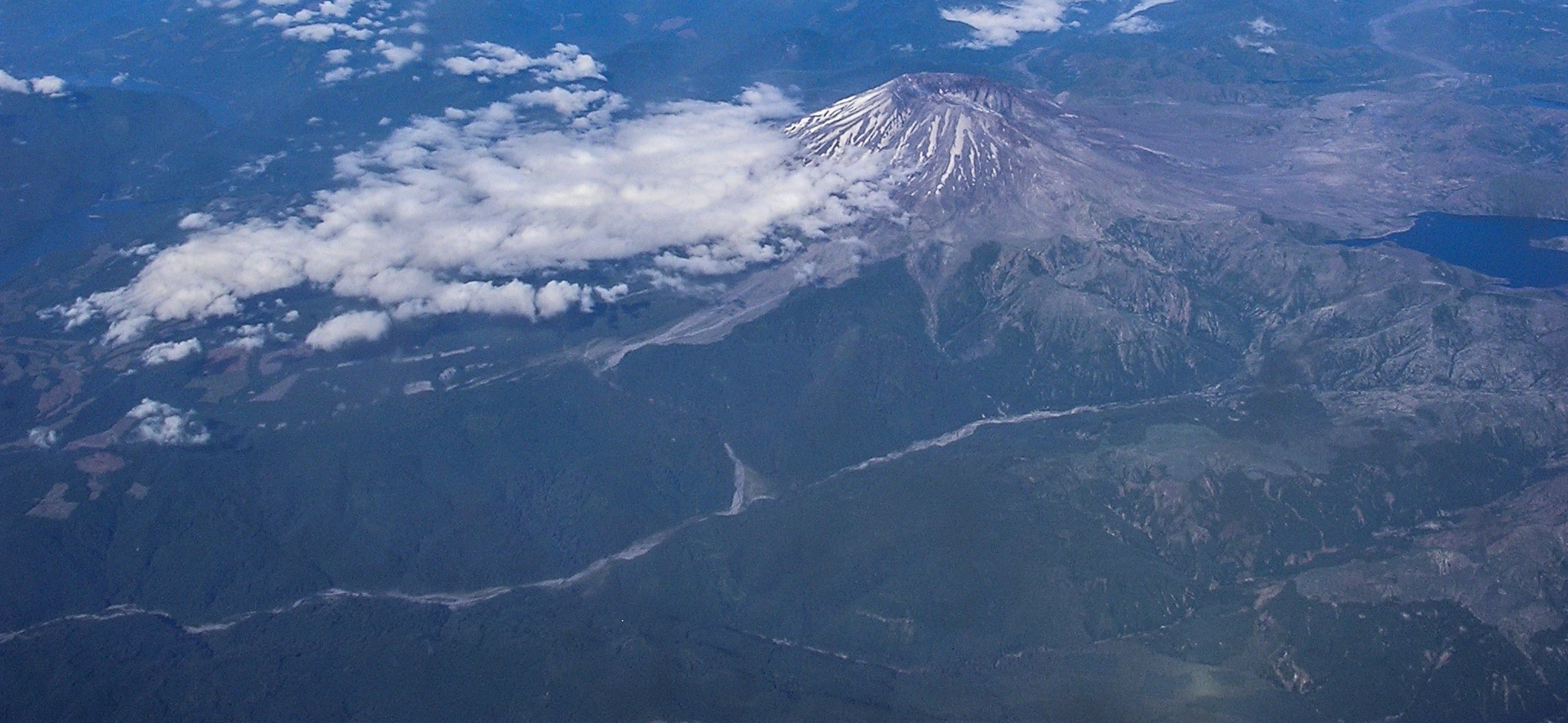 Mount St. Helens taken from a regional jet.